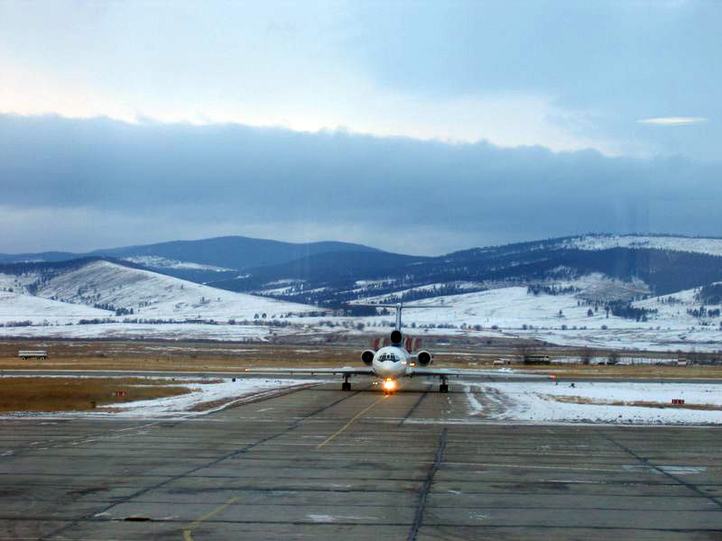 Аэропорт Улан-Удэ.